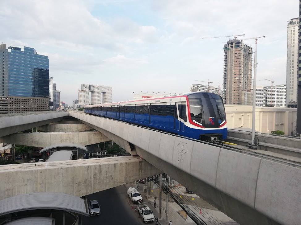 รถไฟฟ้า EMU-B3 ขณะทดสอบวิ่งช่วงห้าแยกลาดพร้าว-ม.เกษตรฯ